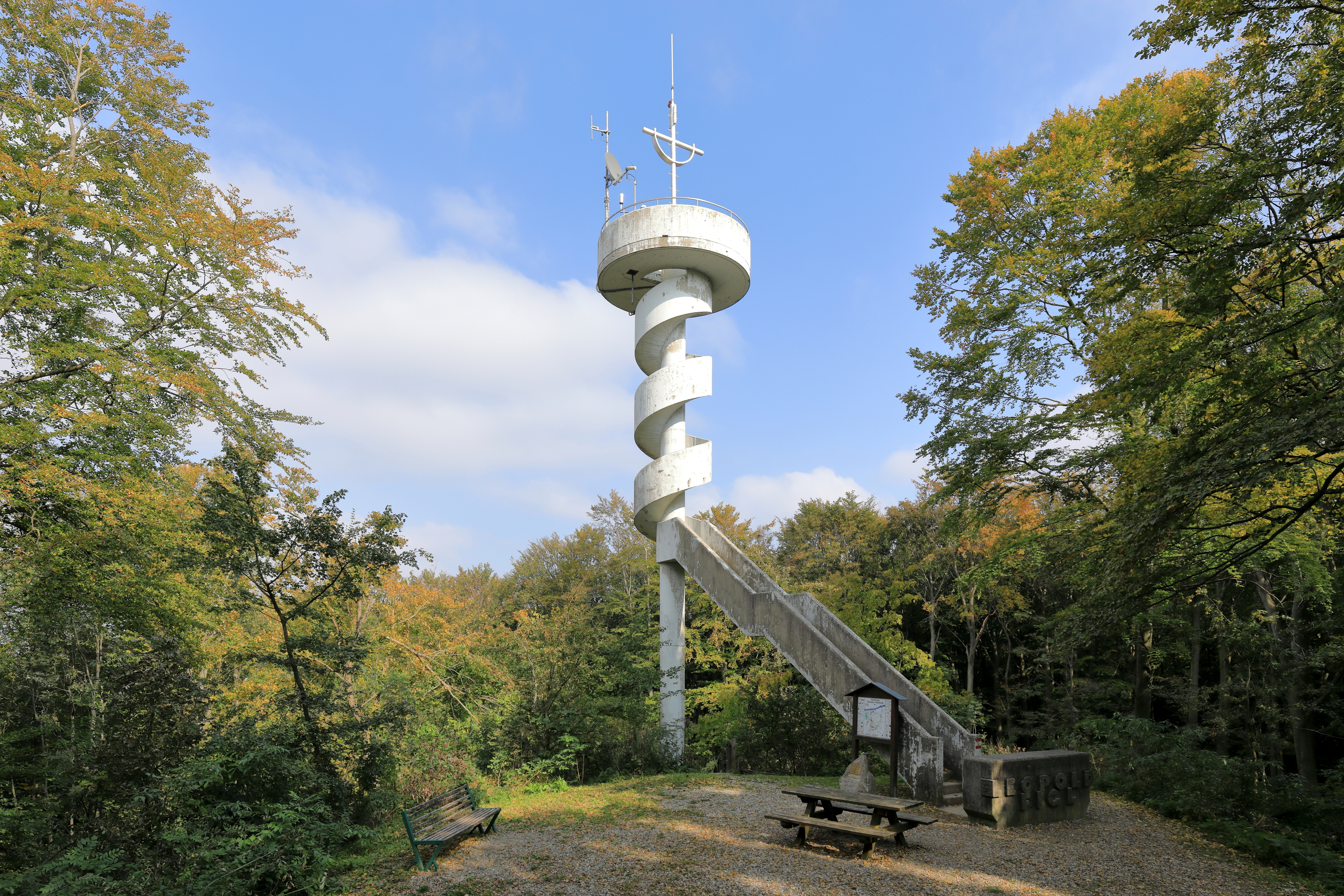 Die Leopold-Figl-Warte auf dem 494 m hohen Tulbinger Kogel in der niederösterreichischen Marktgemeinde Tulbing. Die nach dem österr. Bundeskanzler Leopold Figl benannte Aussichtswarte wurde nach einem Entwurf von Clemens Holzmeister 1966/67 errichtet.